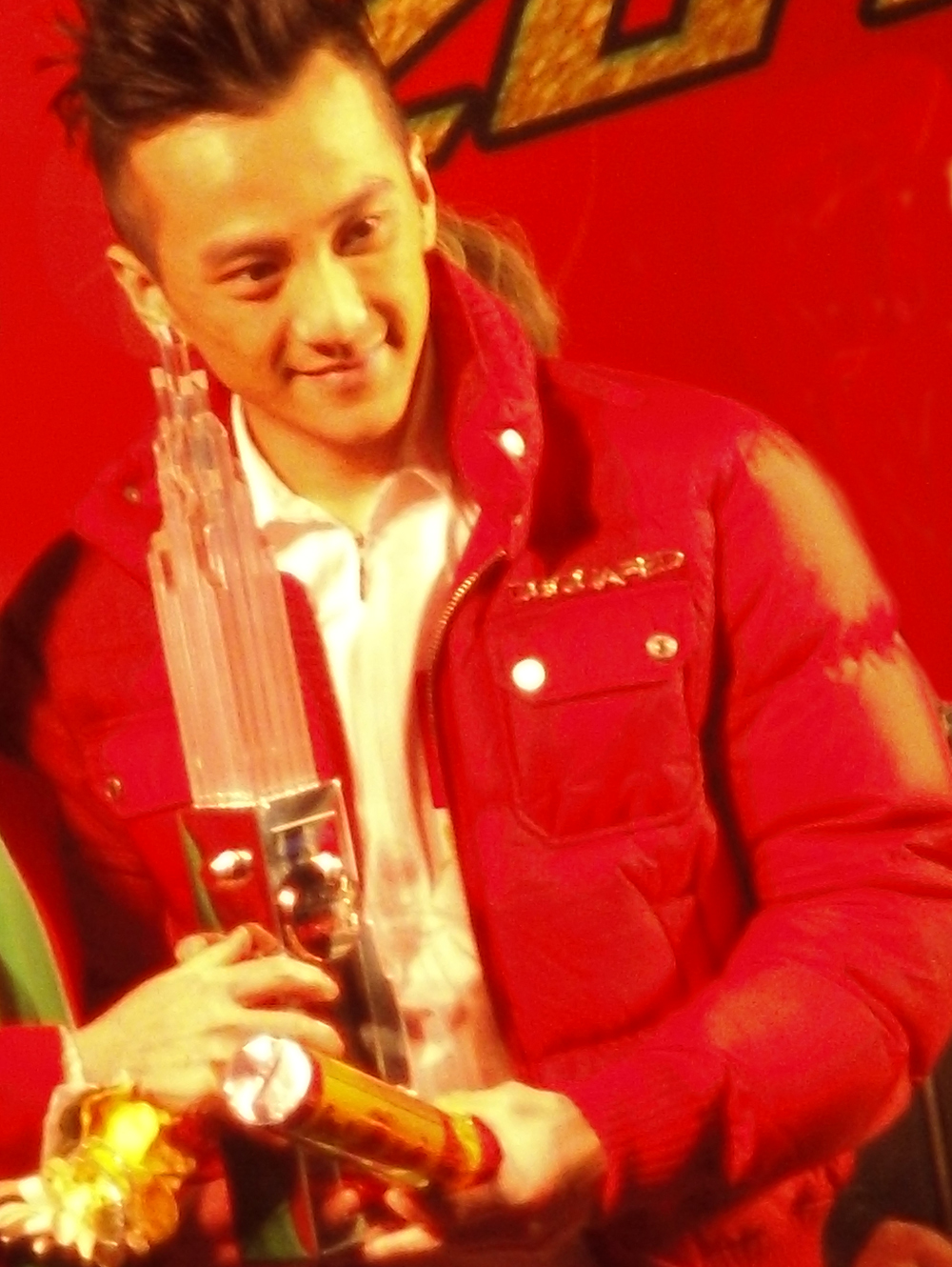 中文（香港）: 郭承匡的樣子